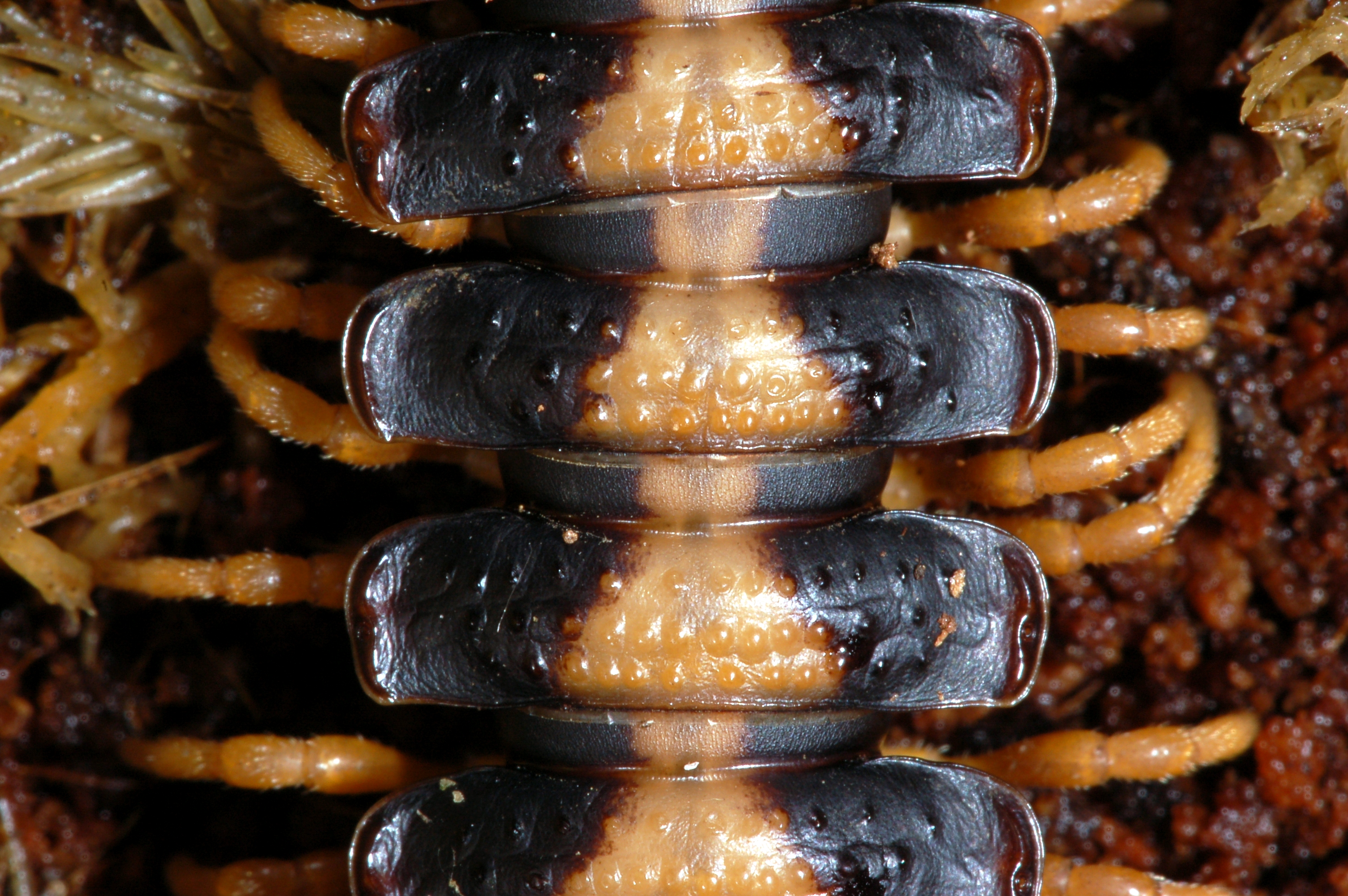 Riesenbandfüßer Coromus vittatus (Diplopoda: Polydesmida: Oxydesmidae) in Gefangenschaft, Museum Wiesbaden, Deutschland